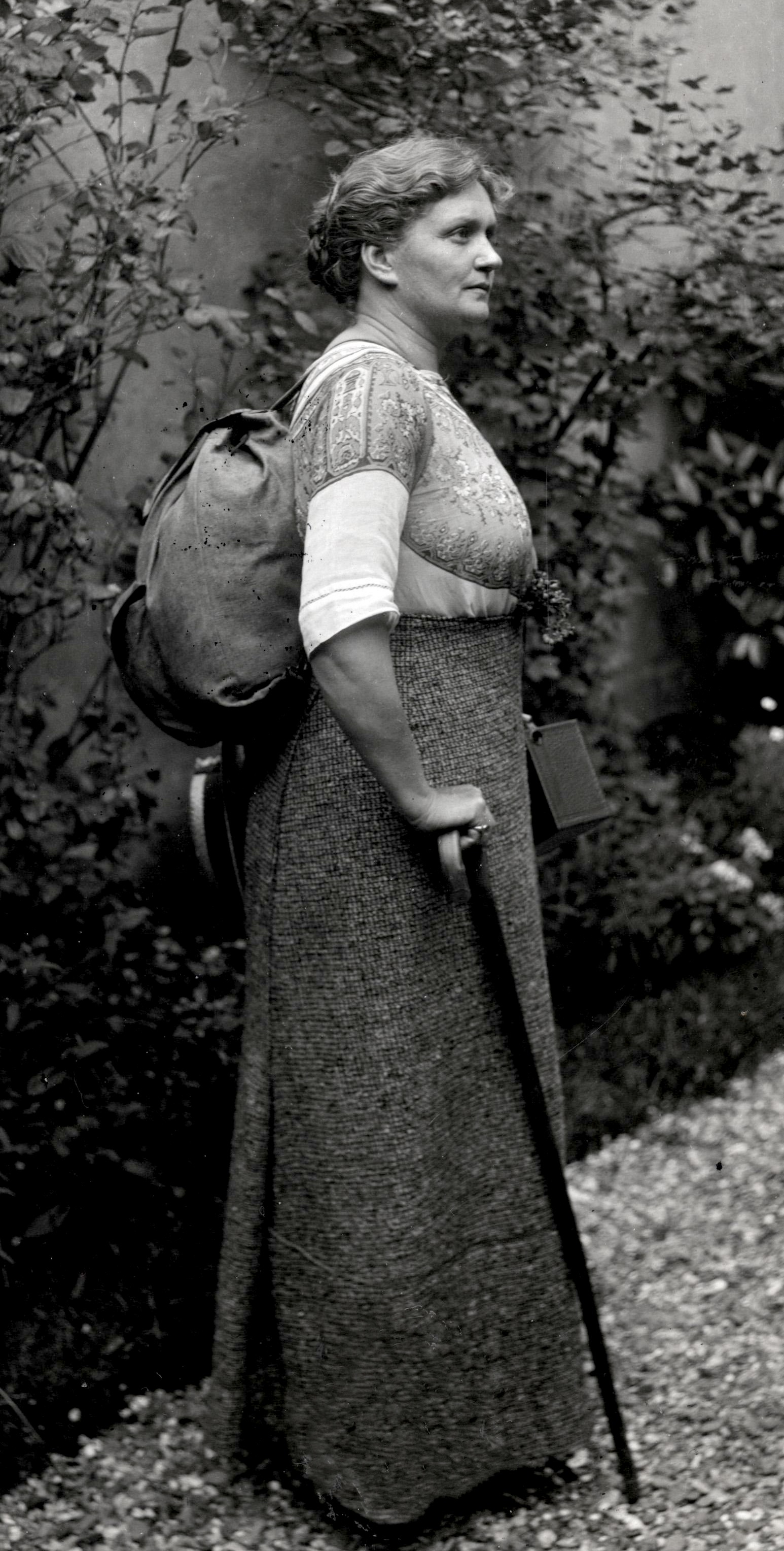 Actrice Caroline van Dommelen, met rugzak en wandelstok, op vakantie-trektocht. 1914.